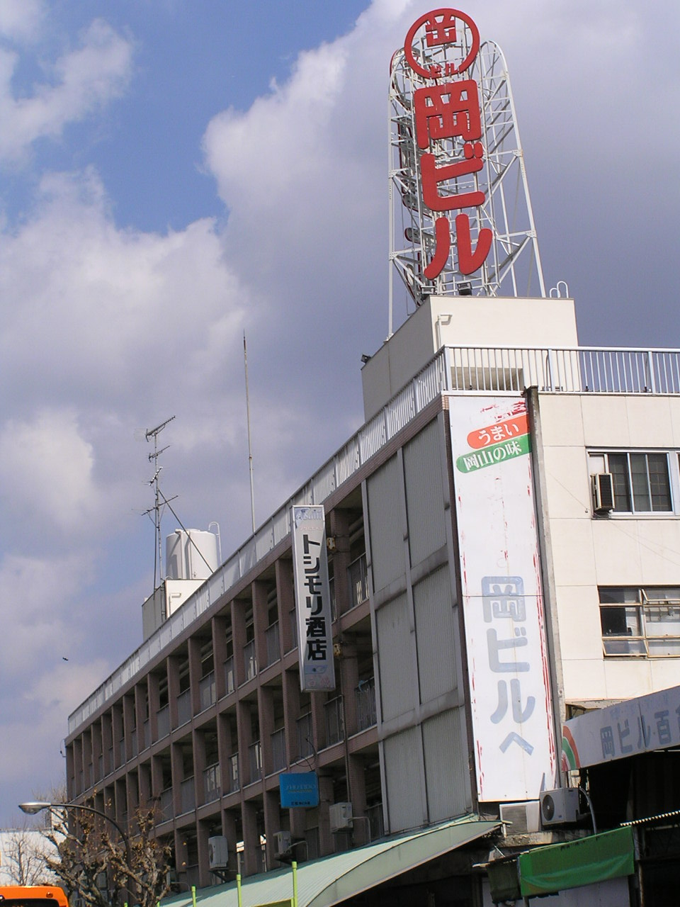 oka bill in okayama city